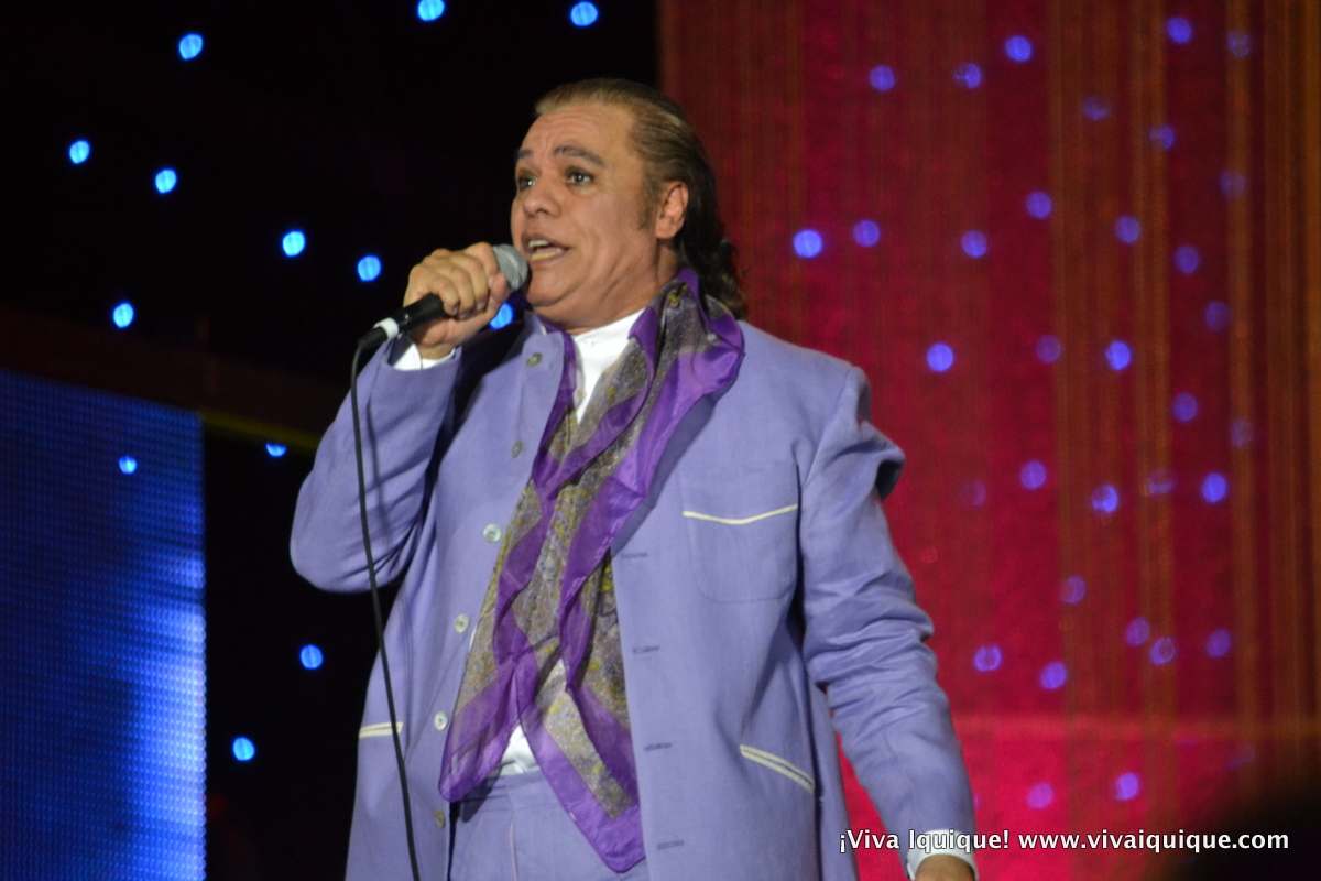 Juan Gabriel en Festival Festival Verano de Iquique